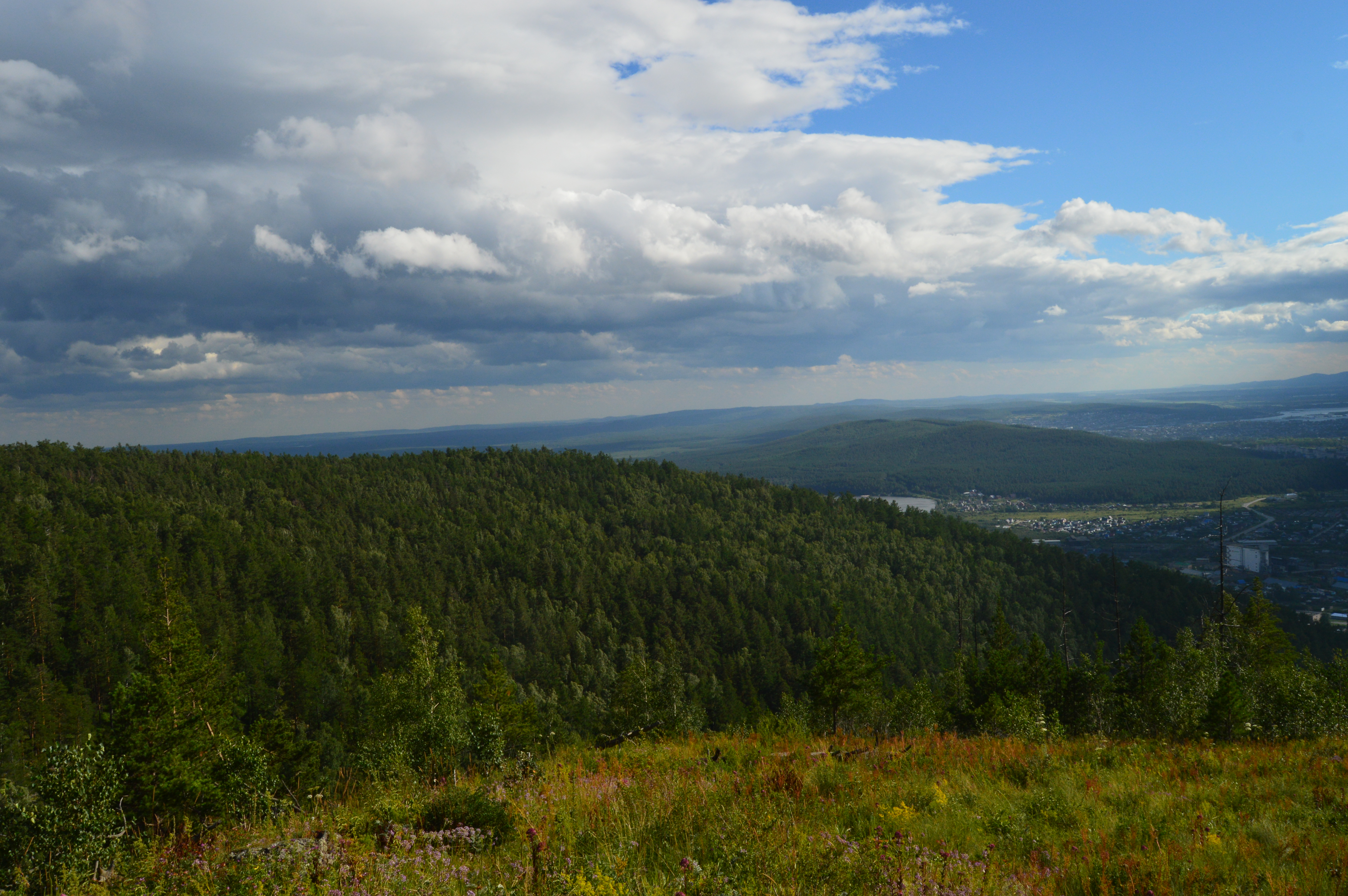 Ильменский государственный заповедник: в восточных предгорьях Южного Урала на Ильменском хребте, к северо-востоку от г. Миасс. Большая часть расположена на территории, административно подчиненной г. Миасс, остальная врезается в соседние районы - Чебаркульский и Аргаяшский, заканчиваясь вблизи с. Ново-Андреевка, в 20 км от г. Карабаш, Миасс-1, Миасский городской округ, Челябинская область This image is related to the protected area of Russia number 7400204